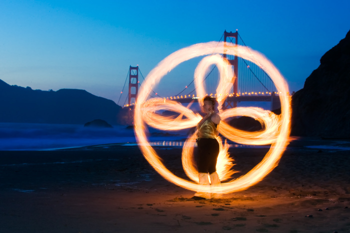 Fire Dancing Golden Gate Bridge